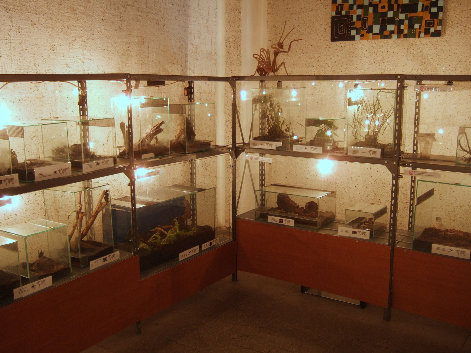 Palangos insektariumas